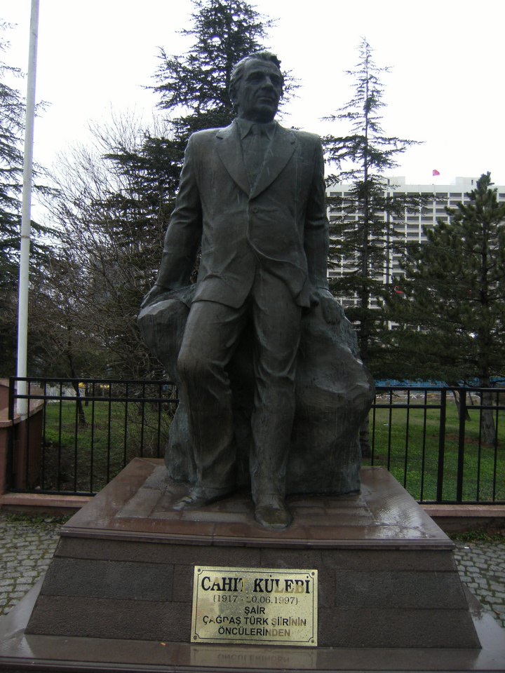 Milli Kütüphane önüdeki Cahit Külebi heykeli